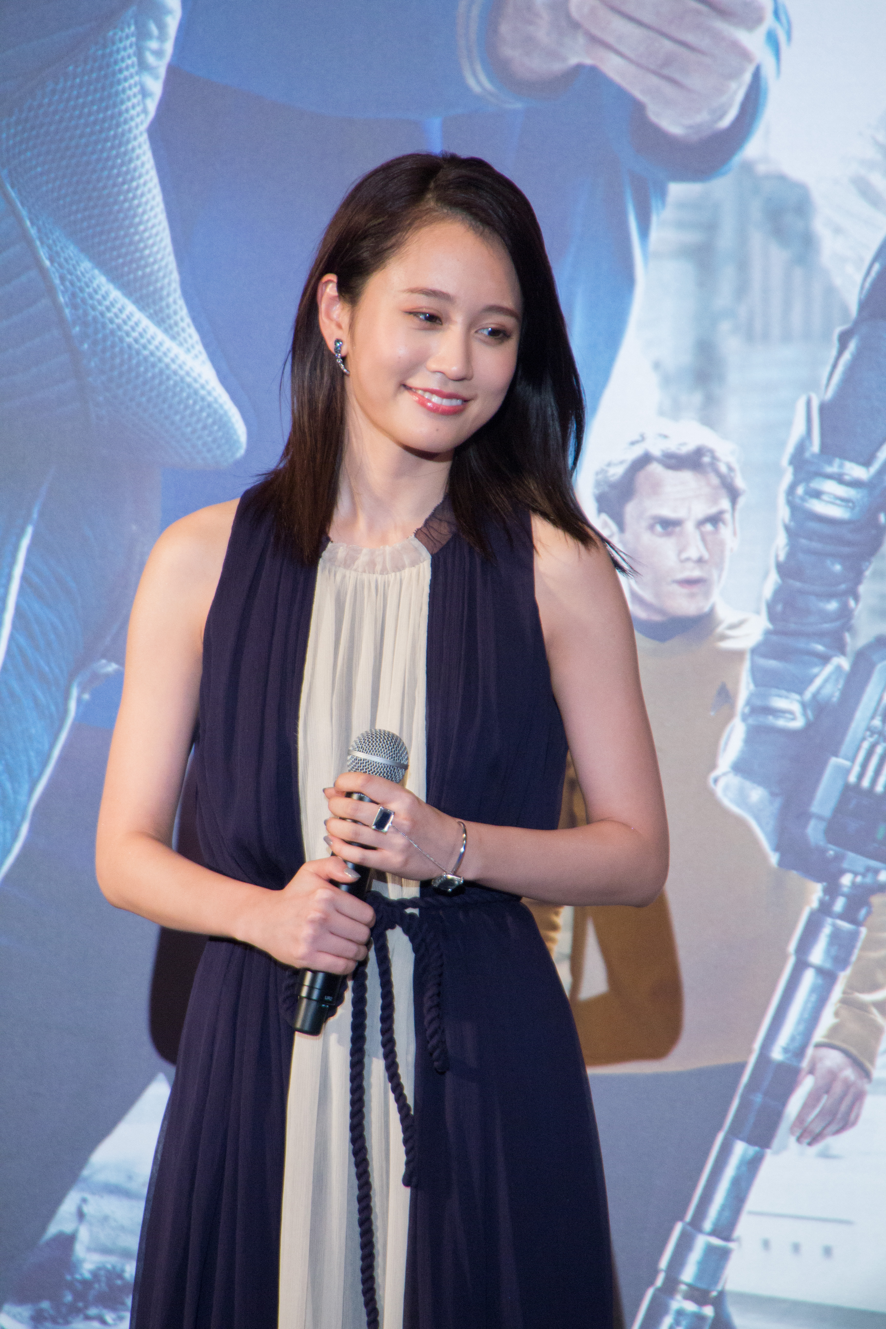 スター・トレック BEYOND ジャパン・プレミア レッドカーペット 前田敦子